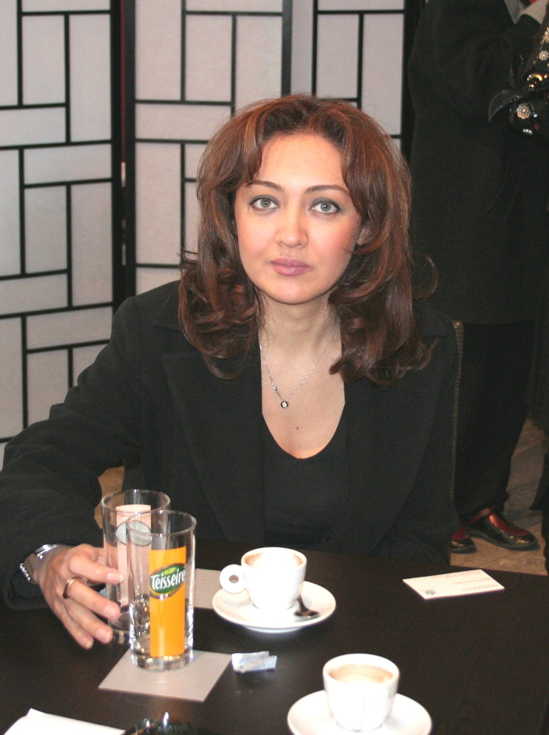 Niki Karimi